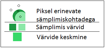 Sämplimise protsess. Värvide keskmise arvutamine.